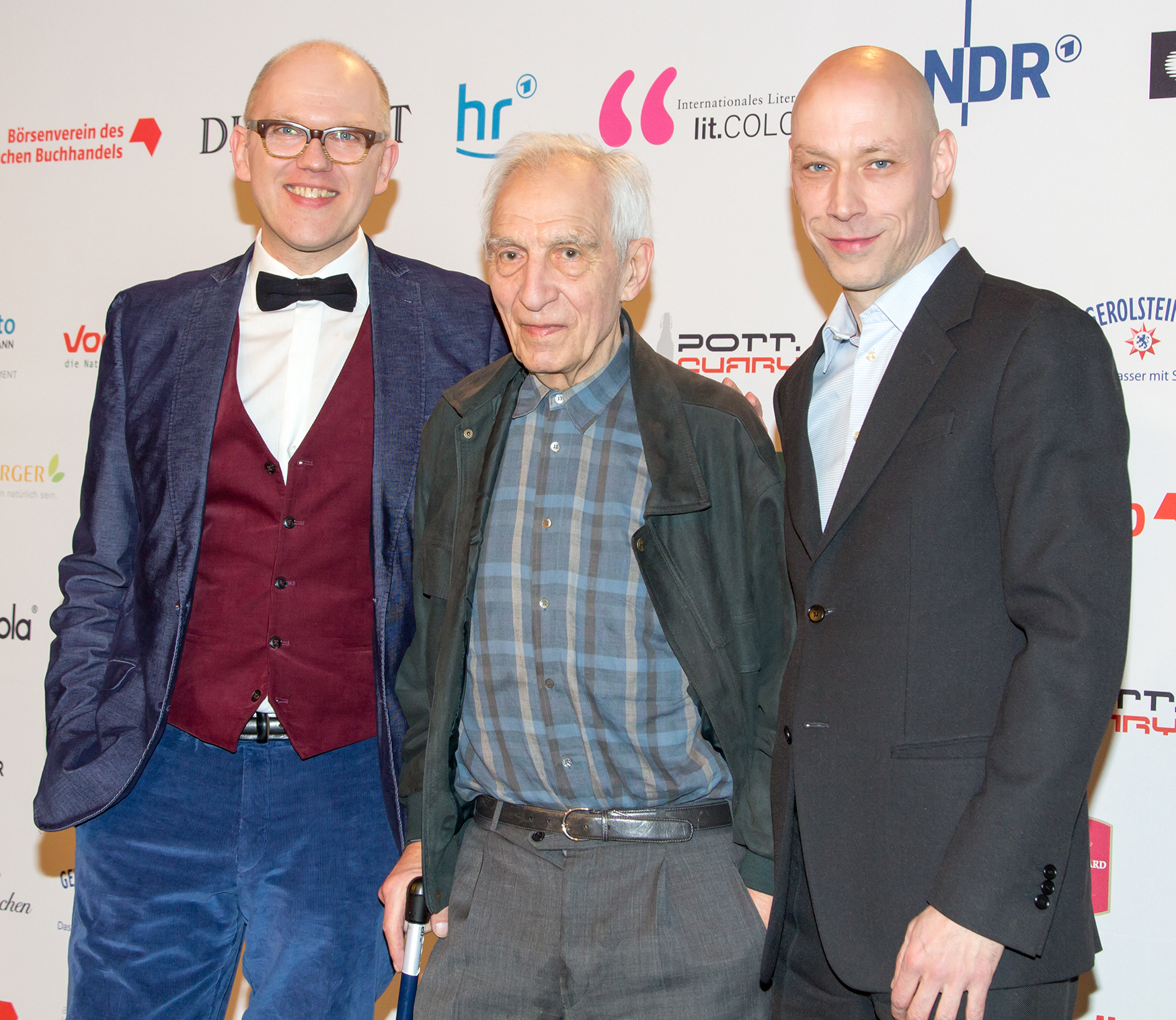 Deutscher Hörbuchpreis 2015, Thomas Böhm, Dieter Wellershoff, Klaus Sander Preis für das Hörbuch des Jahres